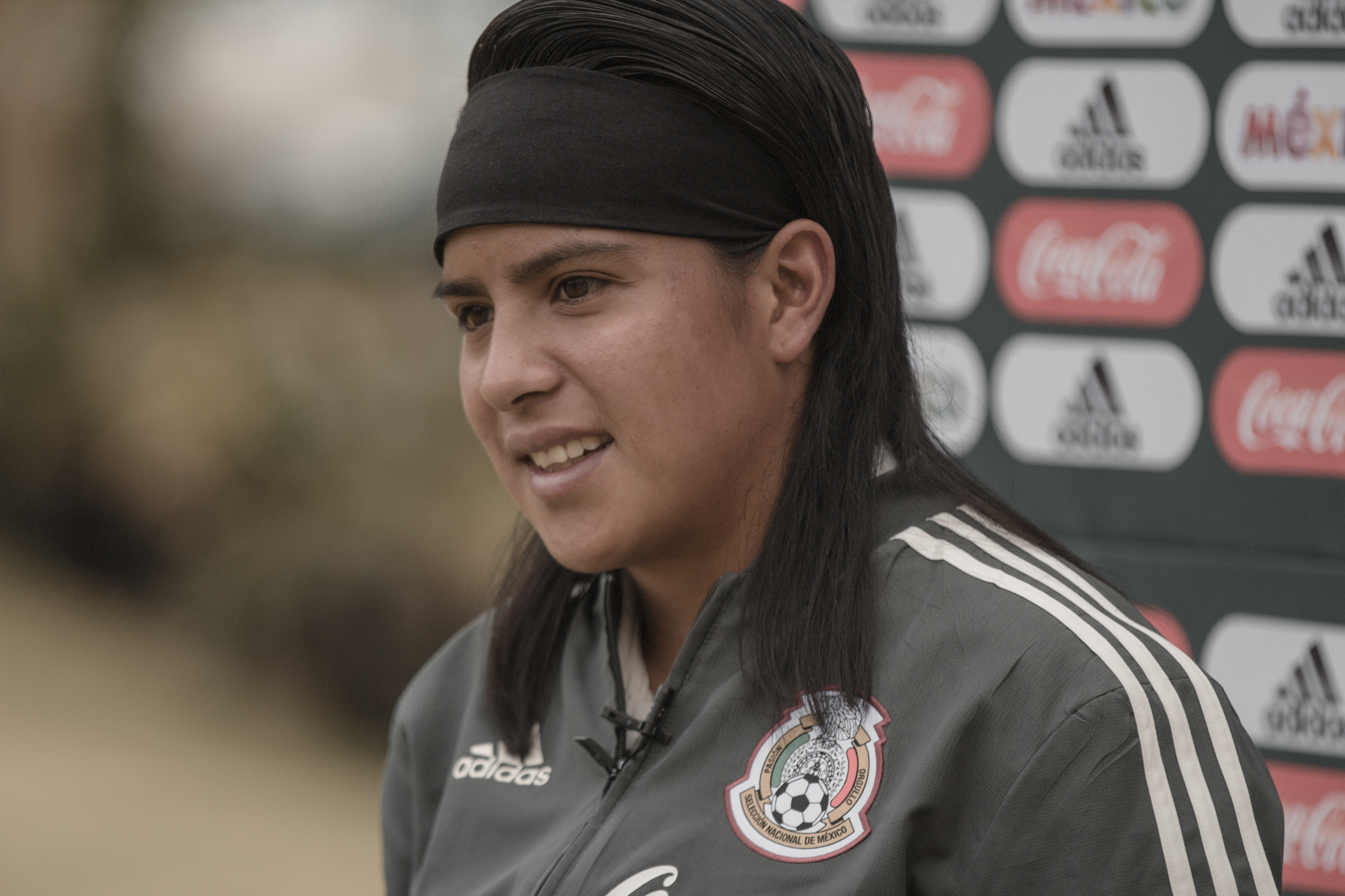 Selección Femenil de Futbol de México.